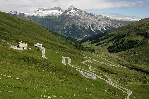 Schweizer Seite vom Splügenpass mit Blick zum Teurihorn